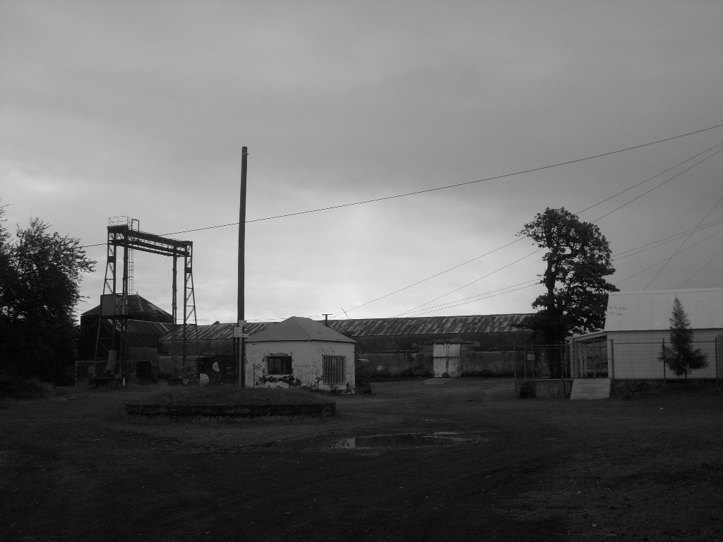 Ancienne usine de Pierrefonds.